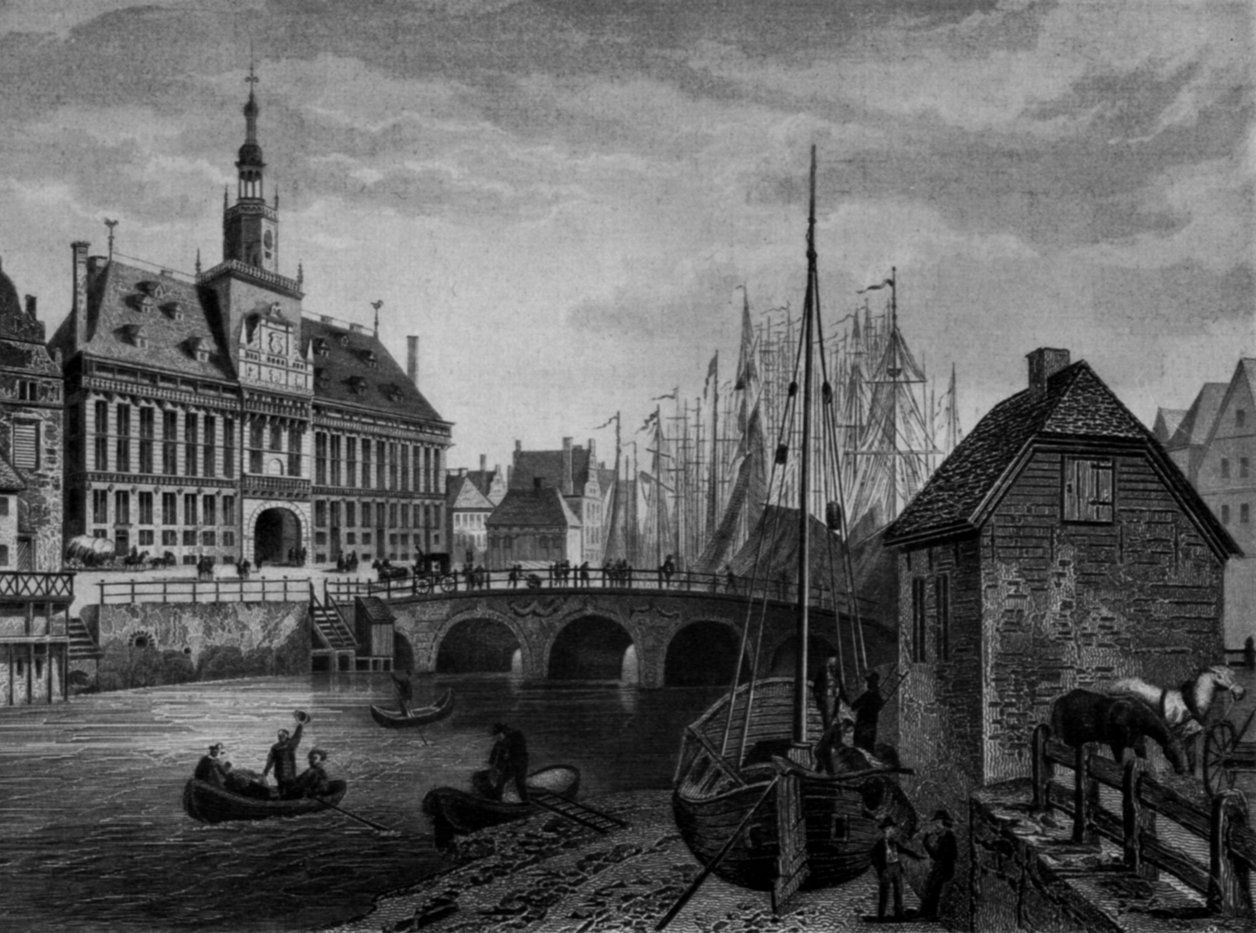 Poppel, Johann Gabriel Friedrich: Emden (Ostfriesland), Hafen und Rathaus, Stahlstich nach einer Zeichnung von Ludwig Rohbock